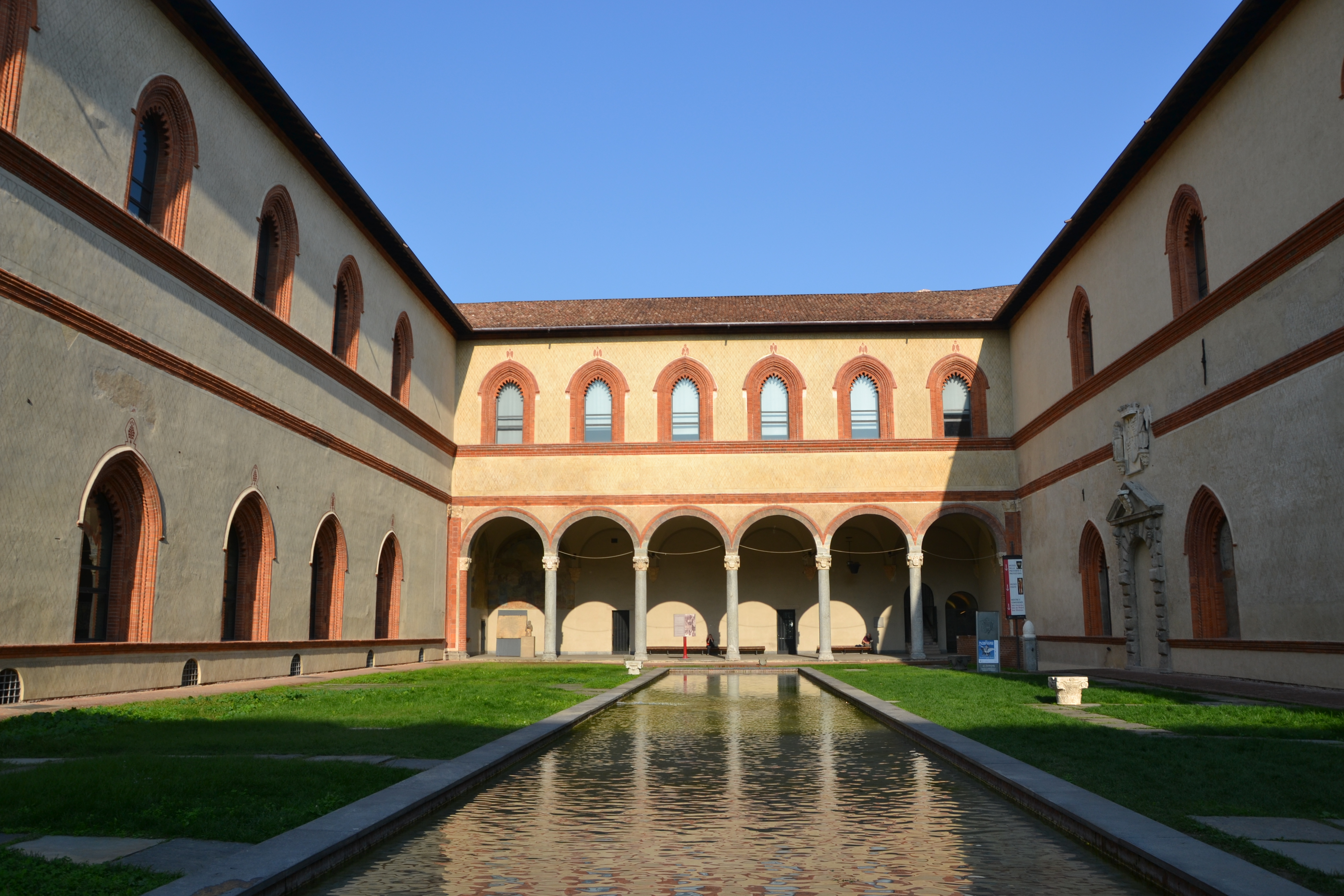 Castello Sforzesco (Milan) - Dukes' Courtyard